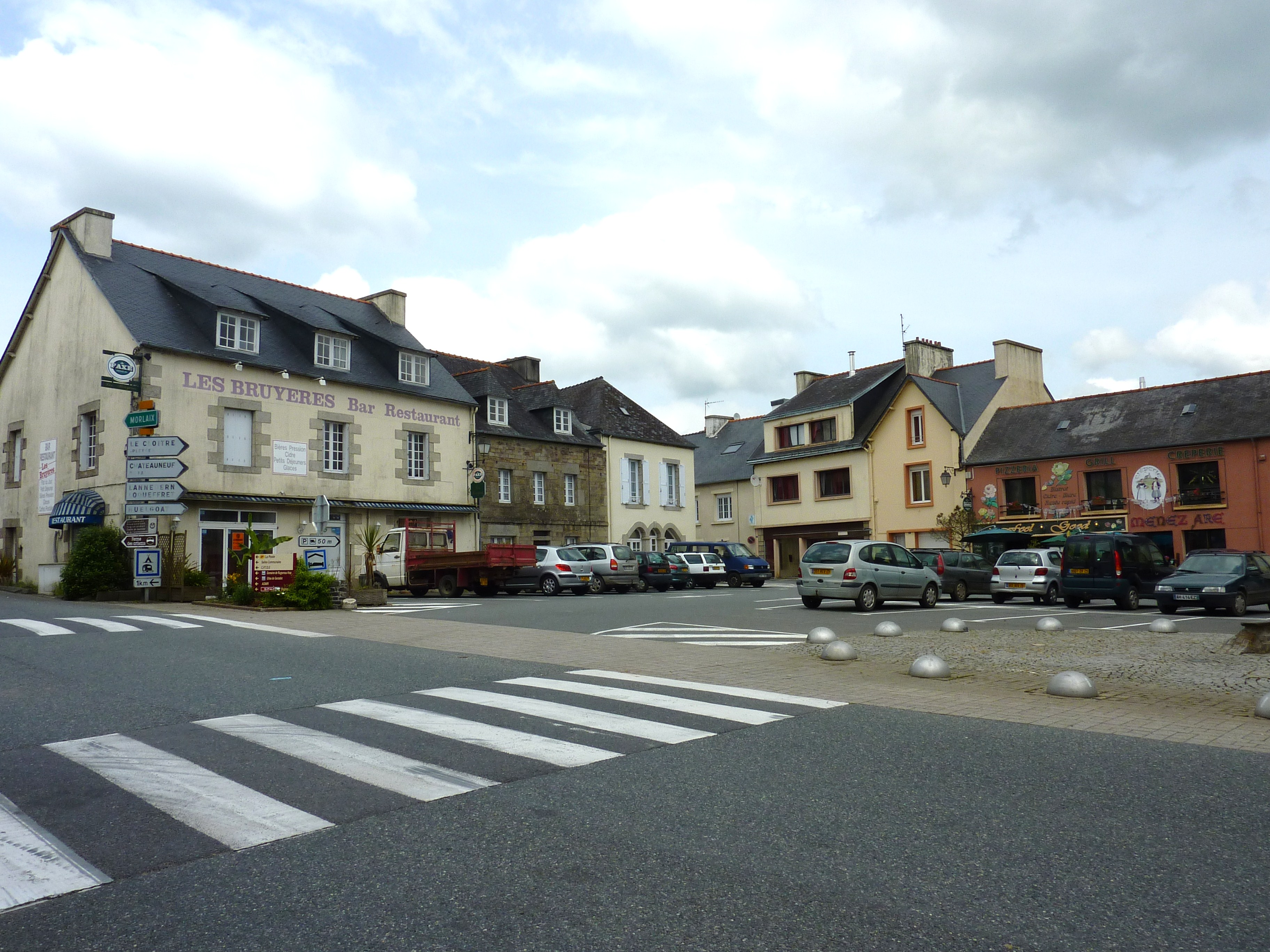 La place principale de Brasparts